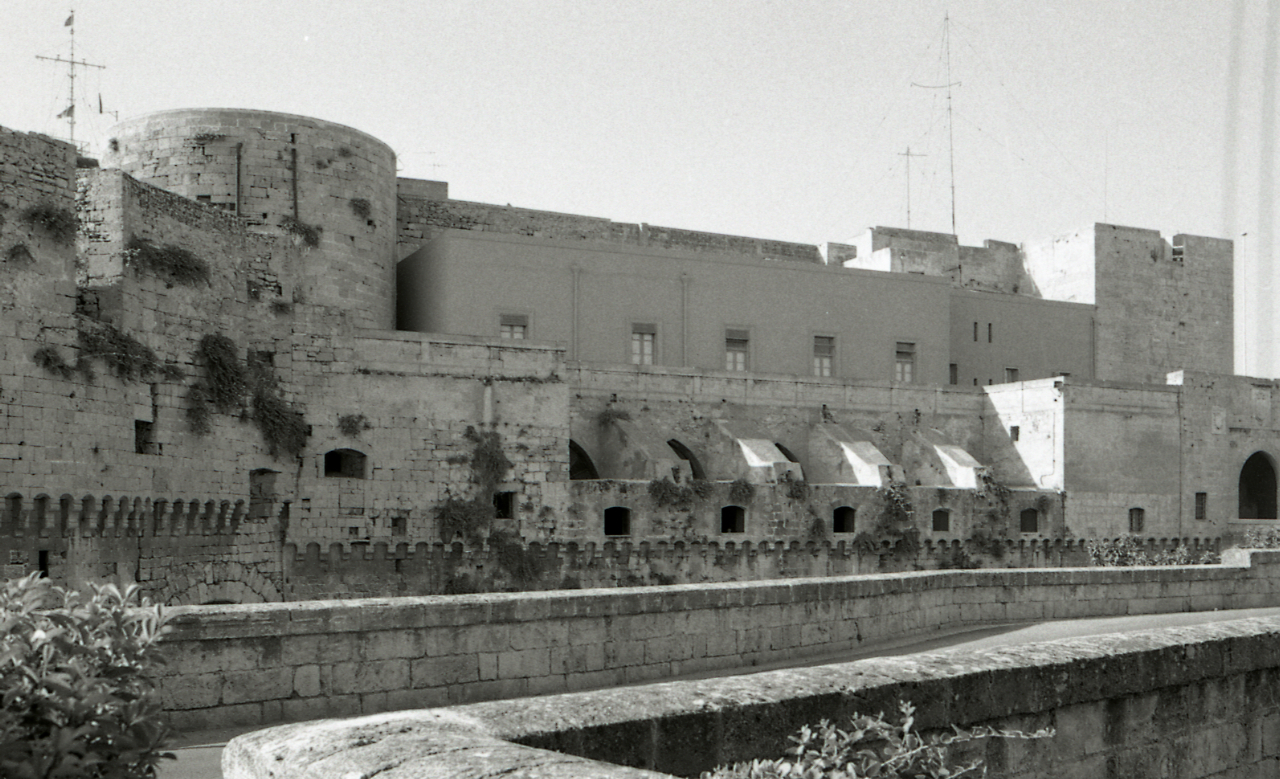 Servizio fotografico : Brindisi, 1970 / Paolo Monti. - Strisce: 4, Fotogrammi complessivi: 19 : Negativo b/n, gelatina bromuro d'argento/ pellicola ; 35 mm. - ((I fotogrammi hanno una doppia numerazione. . - Sul portanegativi: Nikmat FP4. - Fonte: Agenda di Paolo Monti: Monti - Agenda 1970 (1970), presso Archivio Paolo Monti